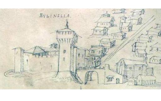 Molinella veduta metà del '500